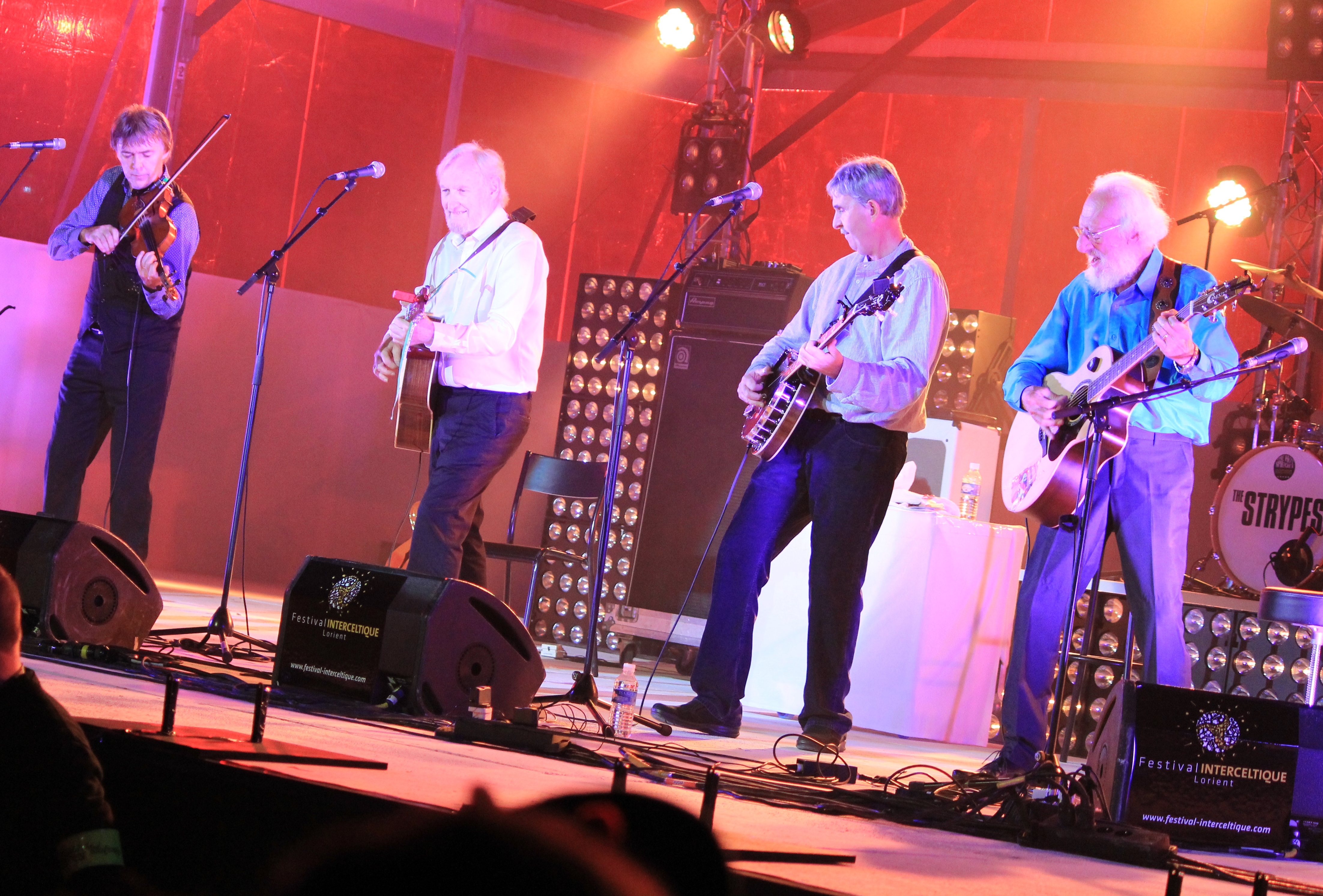 The Dublin Legends en concert au stade du moustoir lors du festival interceltique de Lorient 2014.